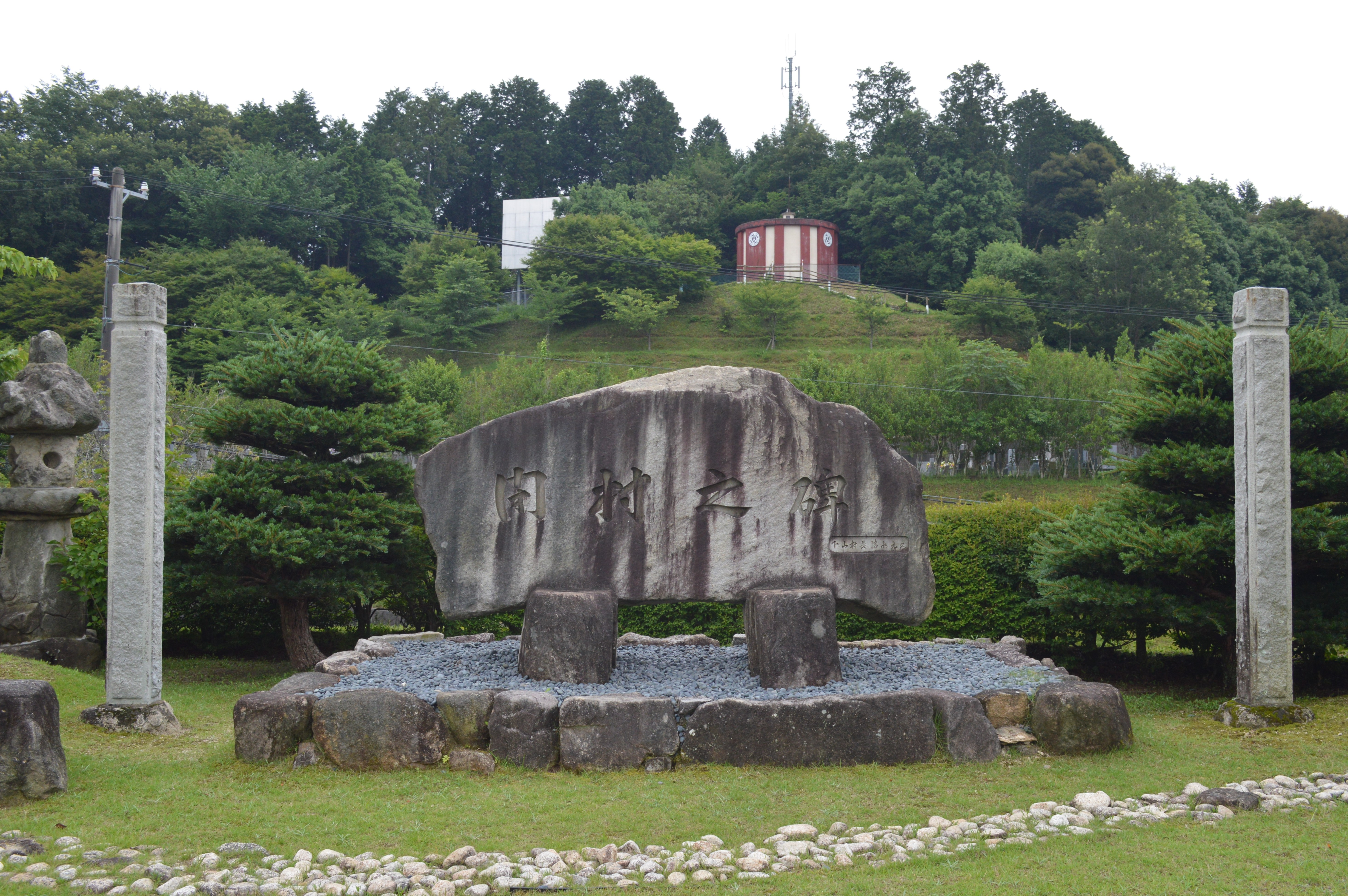 愛知県豊田市大沼町の豊田市役所下山支所の敷地内にある「閉村之碑」。2005年に豊田市に編入された東加茂郡下山村の閉村記念碑。